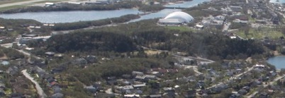 To naboåser øst i Brønnøysund